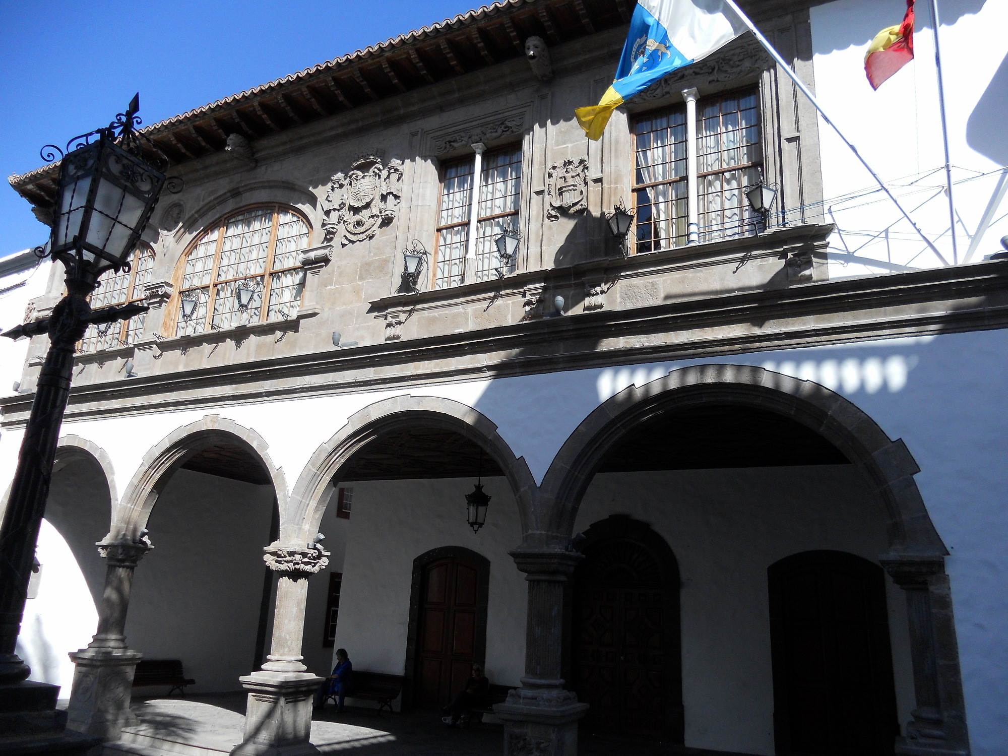 Facciata del palazzo dell'Ayuntamiento in Santa Cruz de La Palma